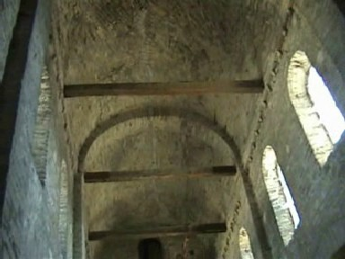 Rundtonne in der Abteikirche Saint Philibert in Tournus Sonstiges: ...